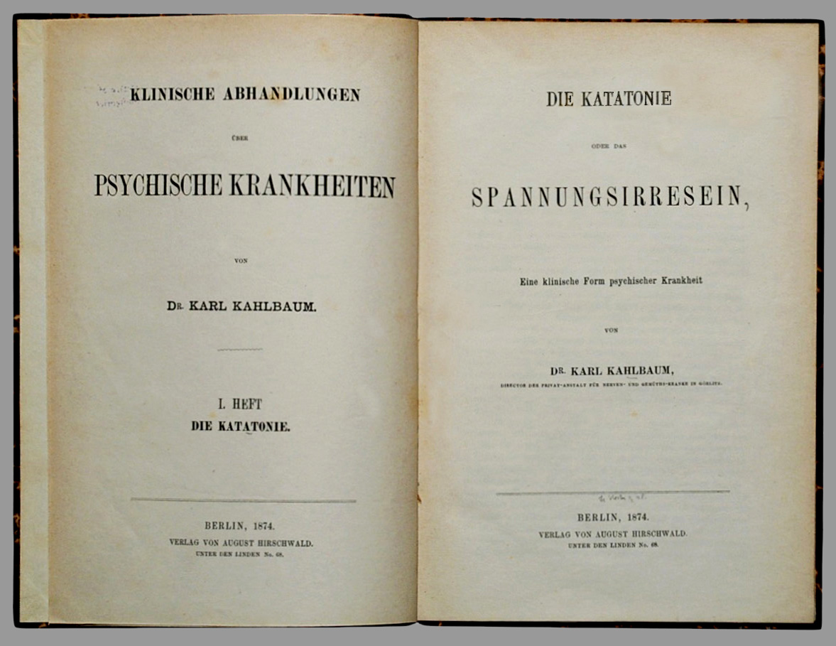 Kahlbaum, K.: Die Katatonie oder das Spannungsirresein. Eine klinische Form psychischer Krankheit. Berlin: A. Hirschwald 1874, 104 S., Erstausgabe. Halb-Leinen d. Zt. mit goldgeprägtem Rückentitel.